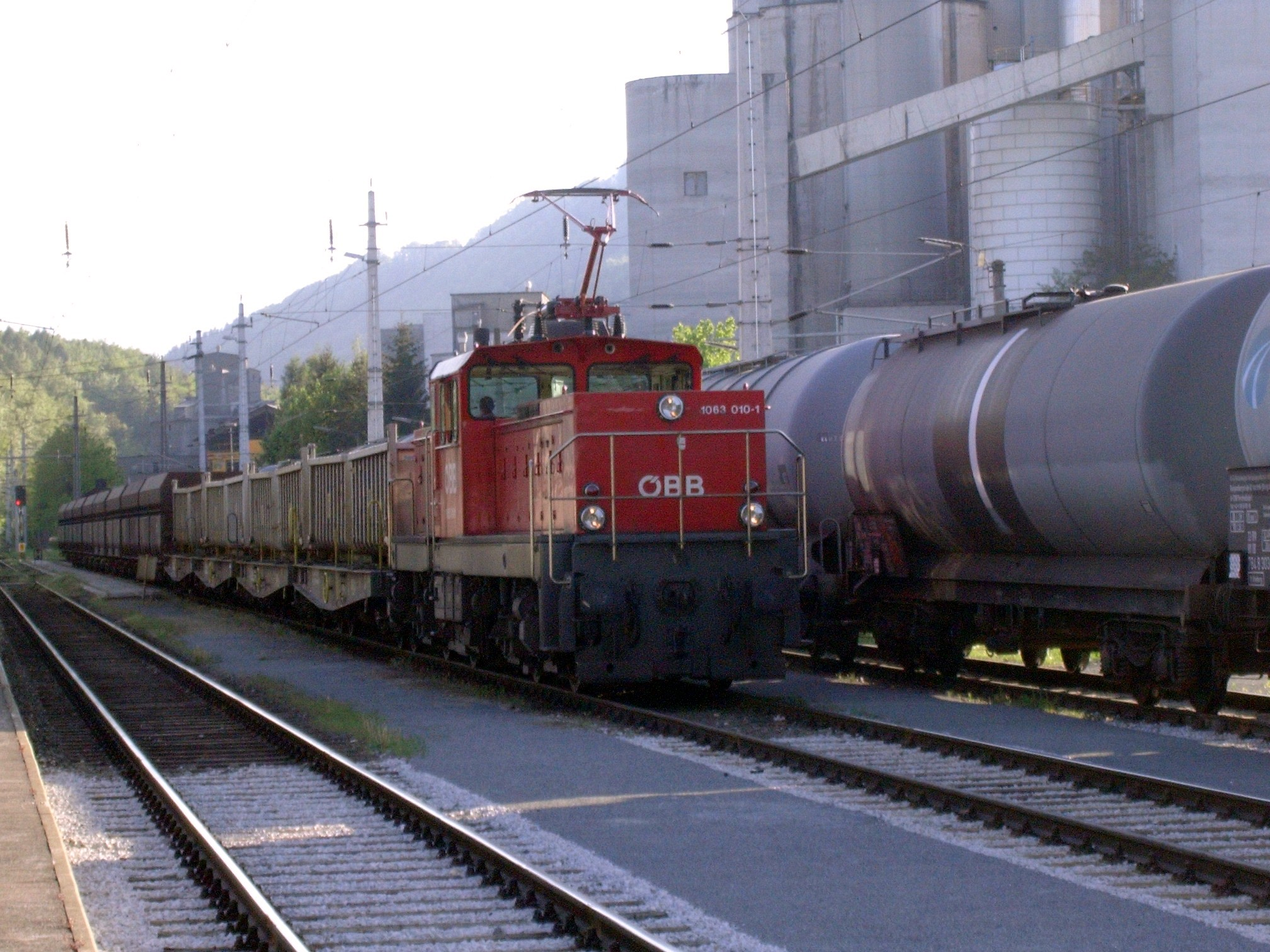 ÖBB 1063 im Bahnhof Gmunden